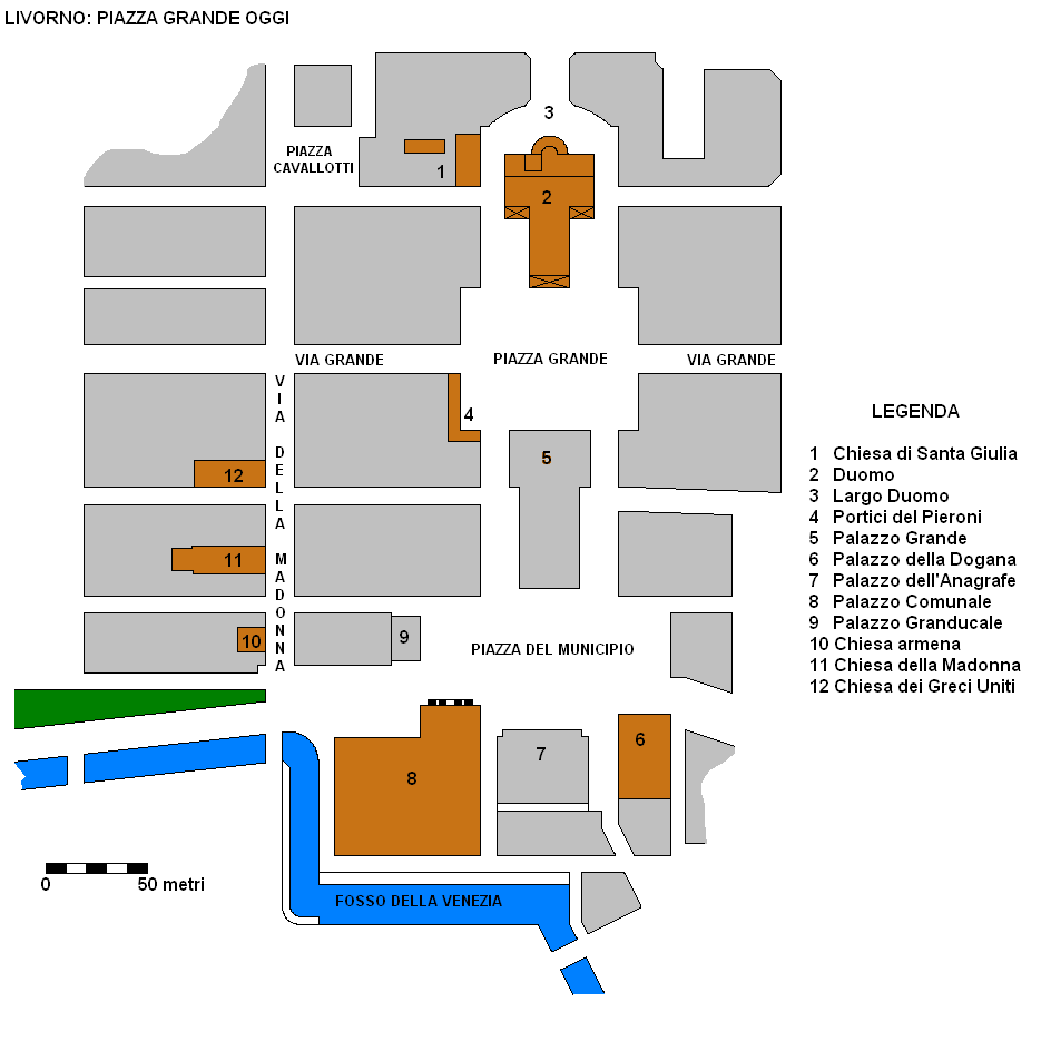 Livorno: planimetria di Piazza Grande dopo le ricostruzioni avviate al termine della seconda guerra mondiale.